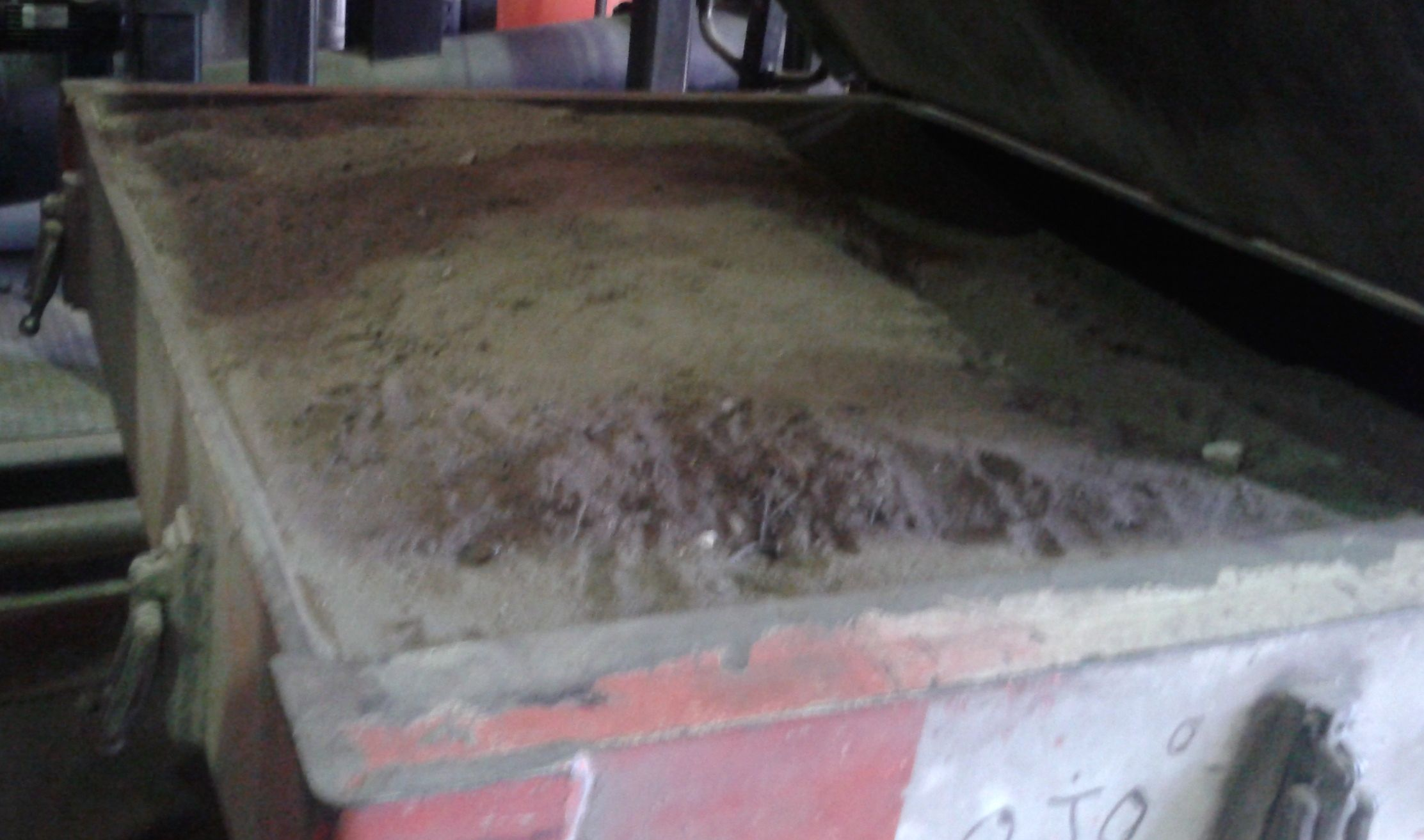 Cendres extretes dels fums (CO2 i altres gasos) calents, per mitjà de ciclons, emesos per la central tèrmica de Molins de Rei que abasteix de calefacció i escalfament d'aigua a 700 famílies del barri de La Granja.